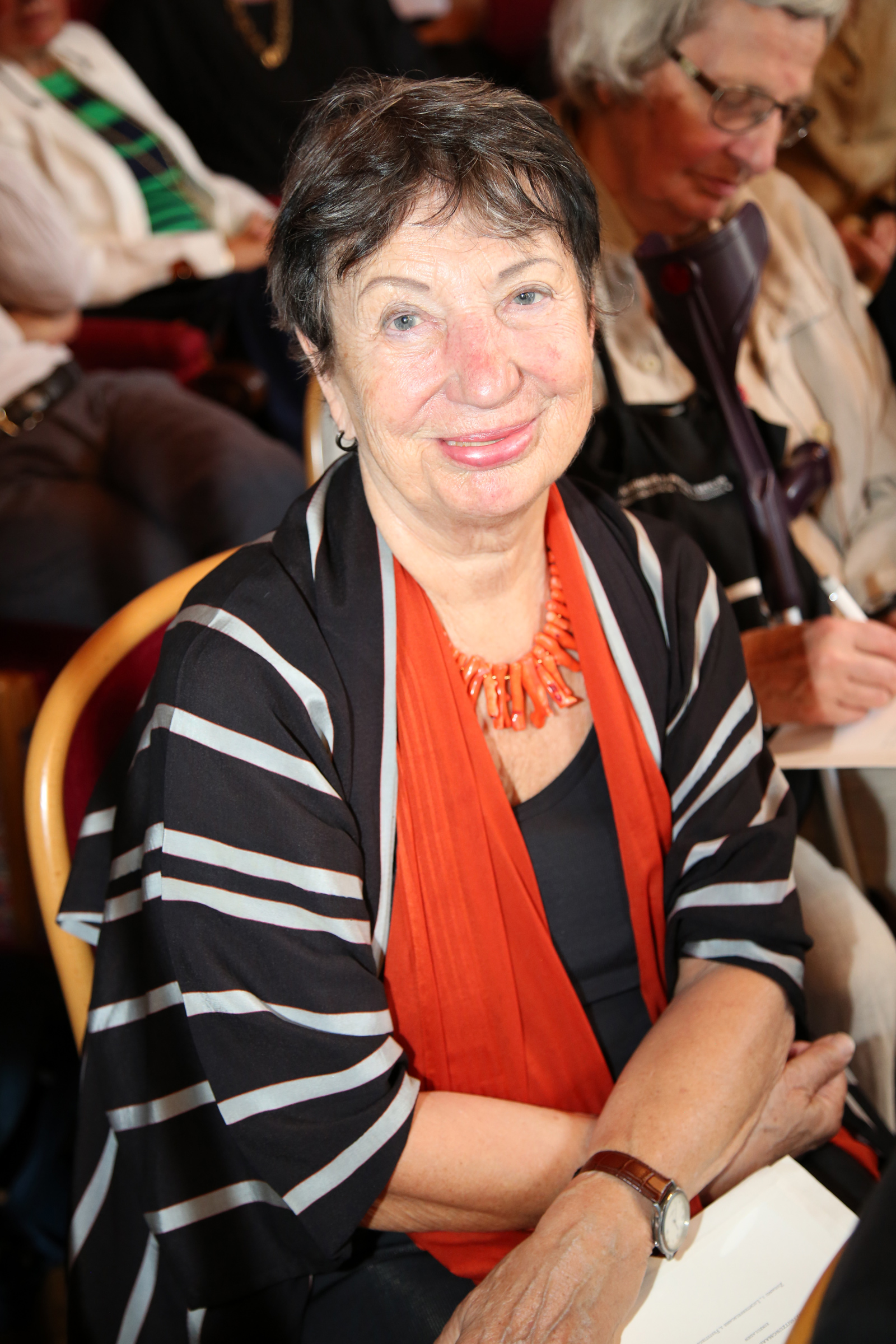 Waber_Linde-5791